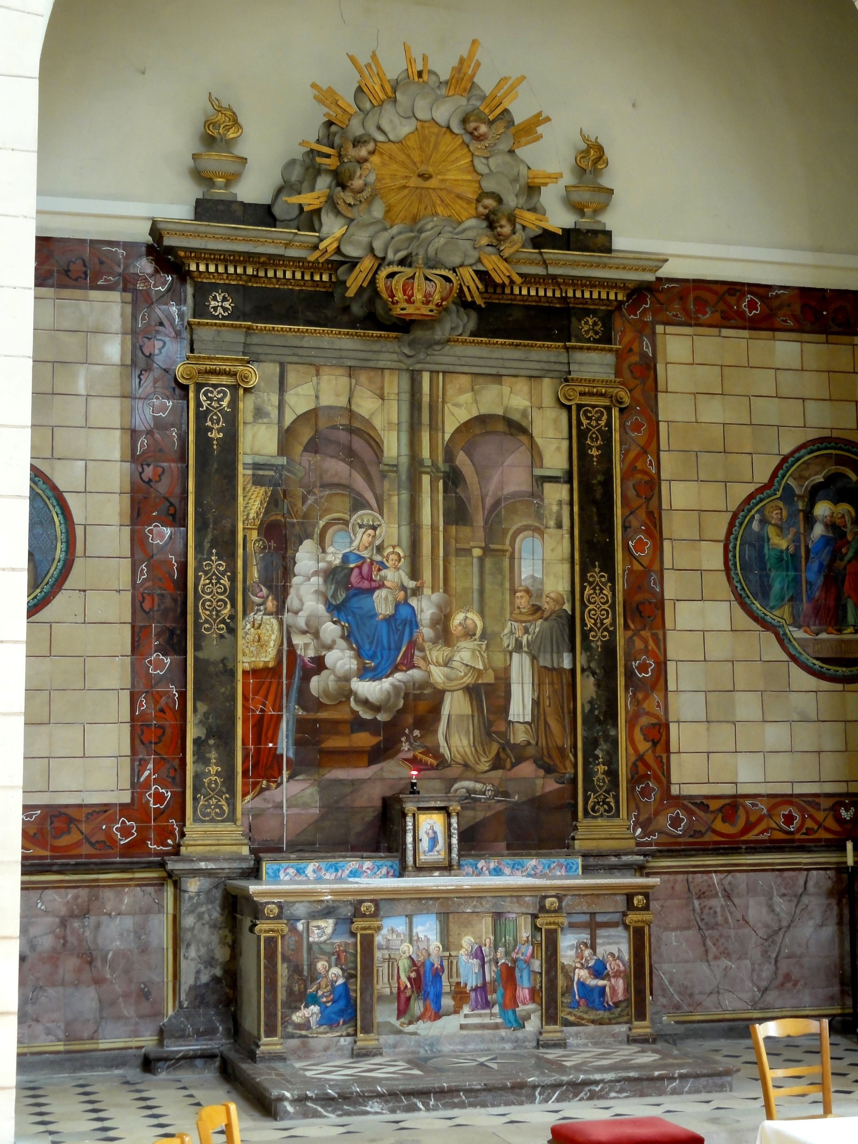 Retable et ancien maître-autel.